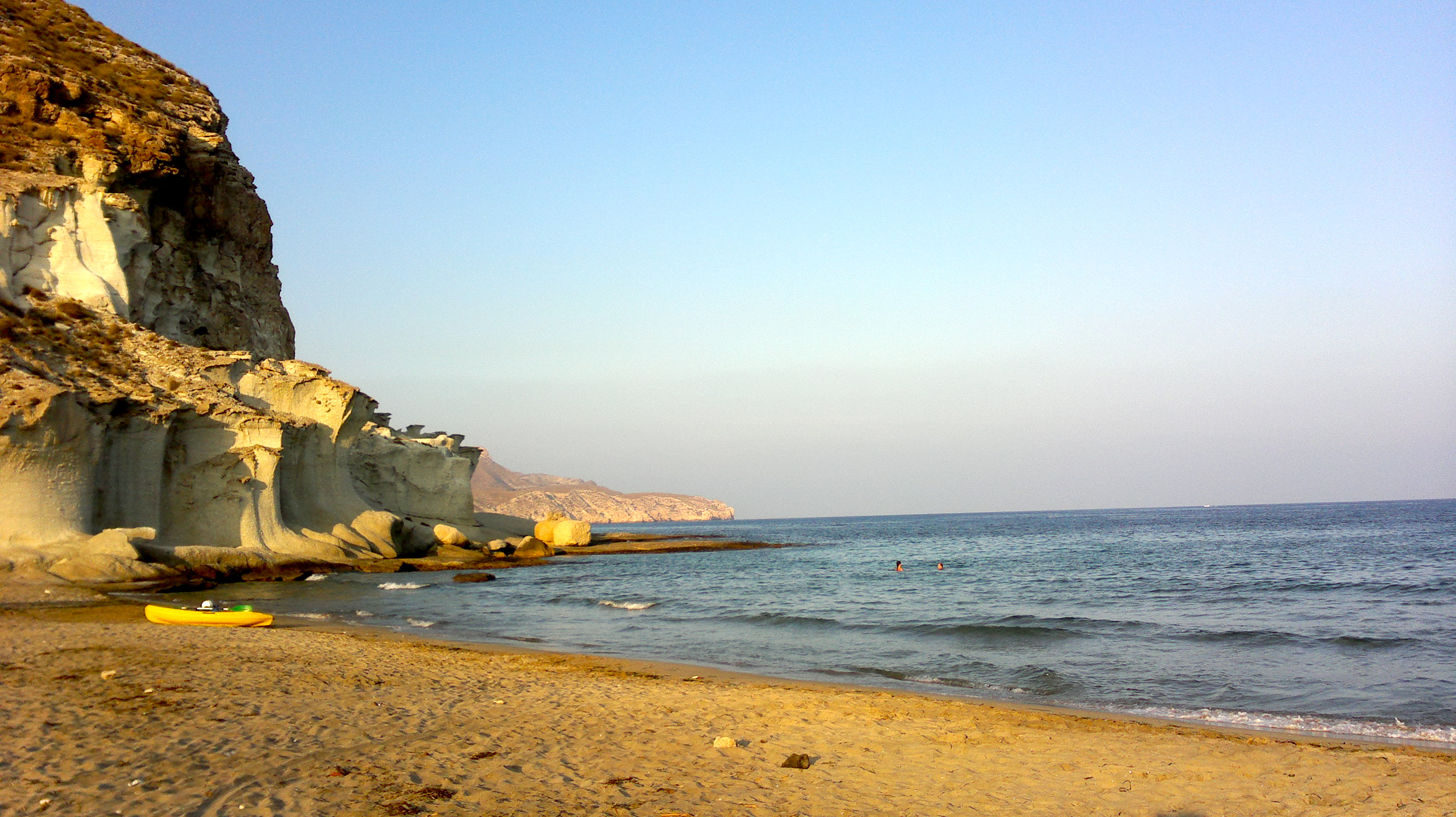 Foto de la Cala de Enmedio en Agua amarga (Almería, ESPAÑA)